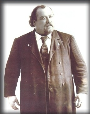 Louis Cyr vers les années 1890